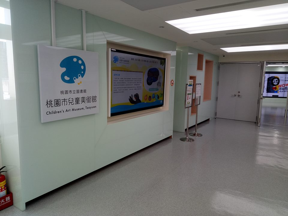 桃園市兒童美術館內部